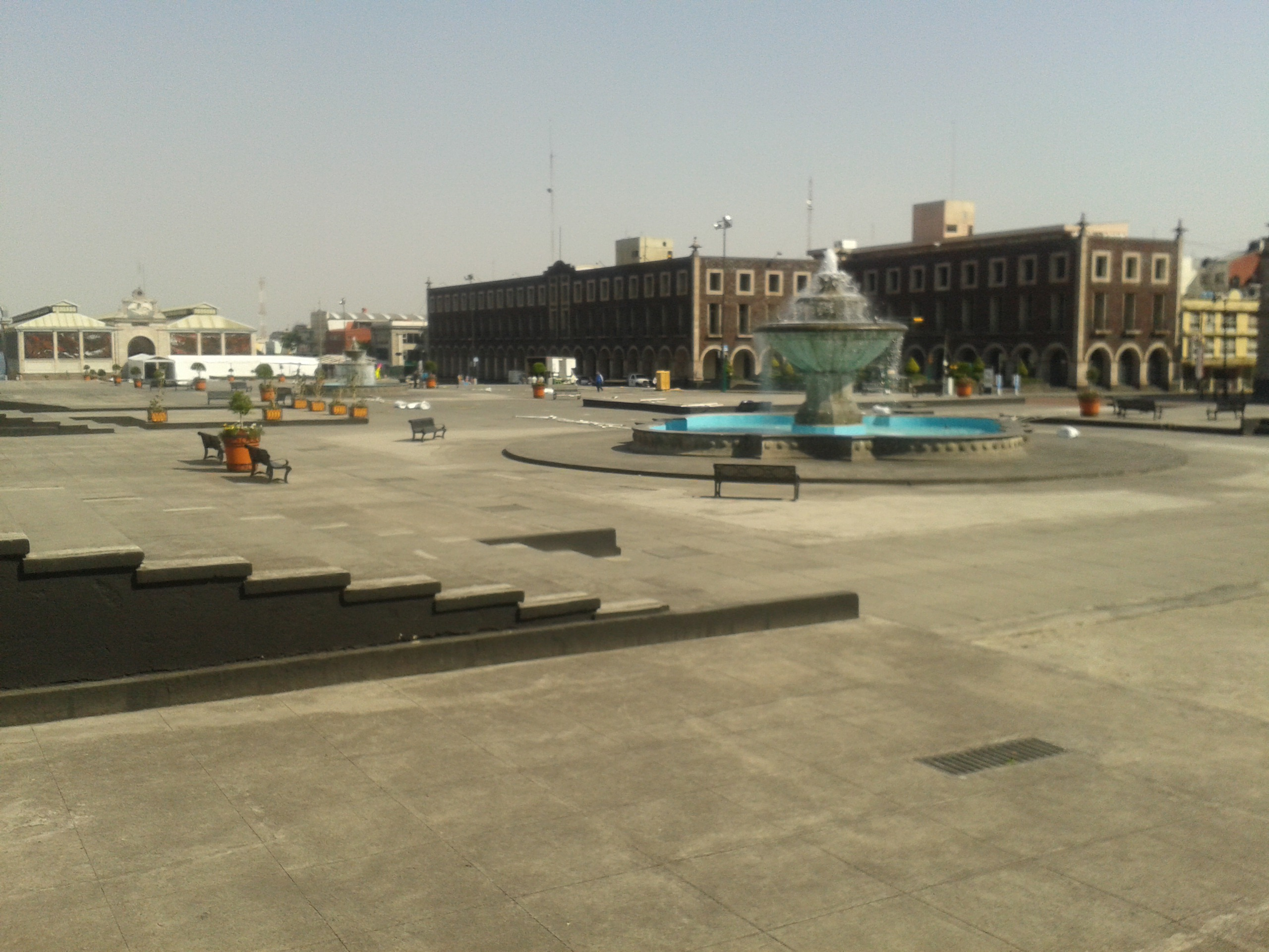 Plaza Angel Maria Garibay